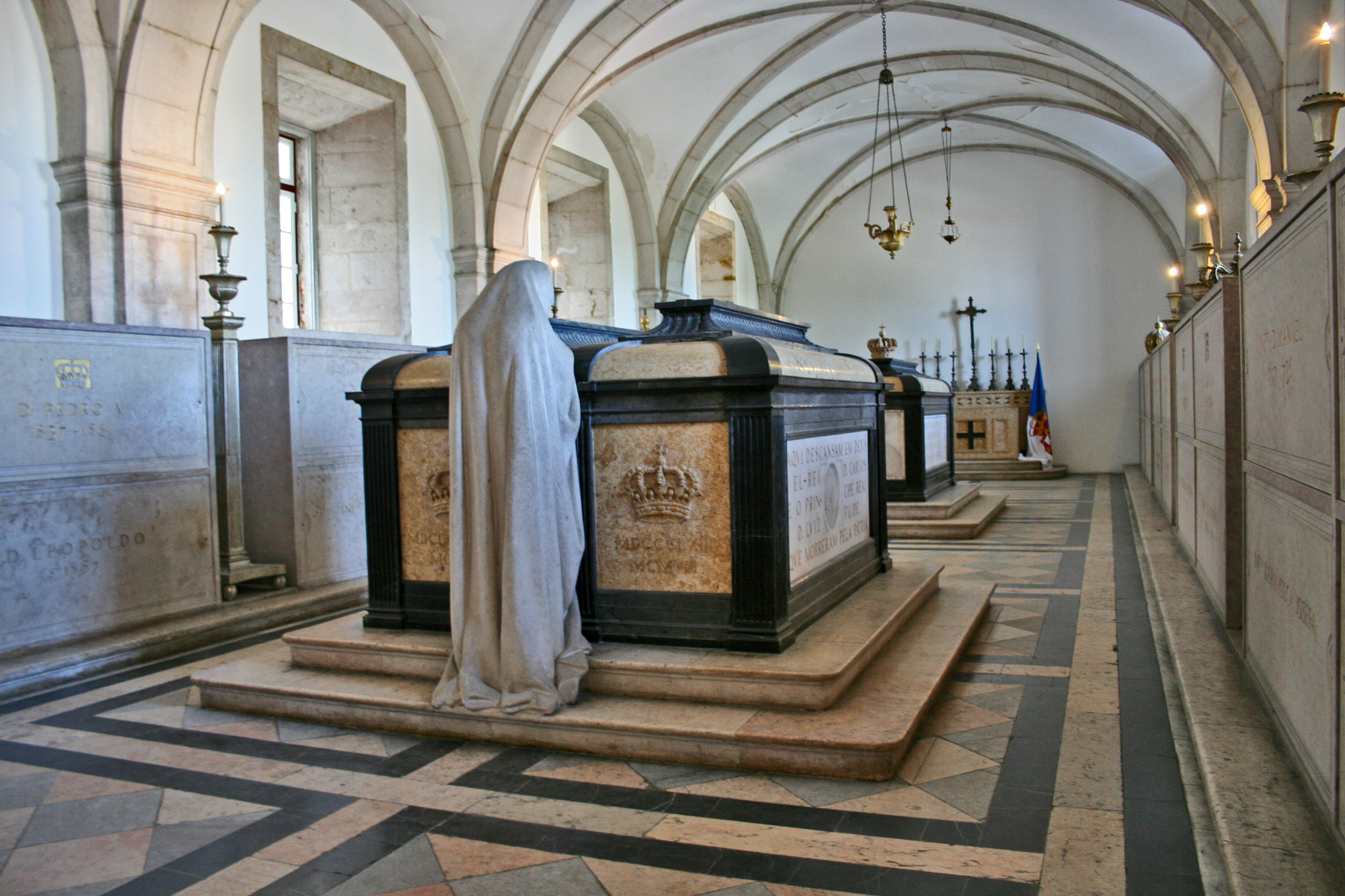 Mosteiro de São Vicente de Fora This file was uploaded for Wiki Loves Monuments in Portugal with the unique identifier 71213.